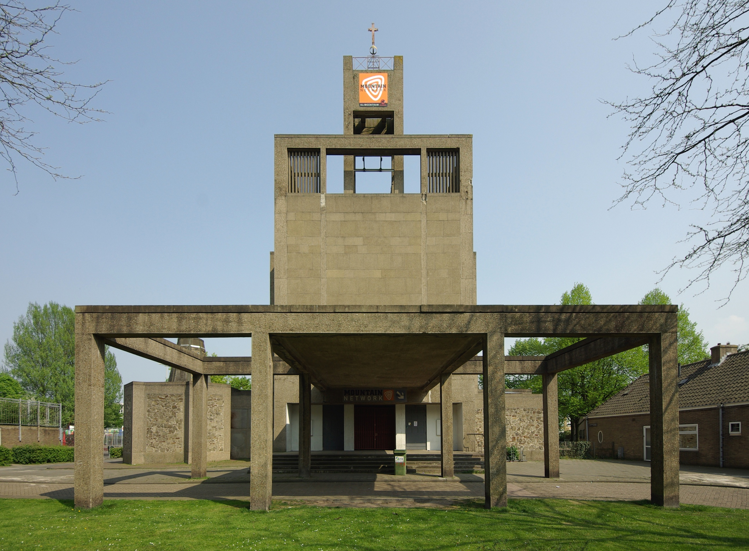 De Sint-Josephkerk aan de Erik de Roodestraat in Amsterdam Bos en Lommer is gebouwd in 1950 tot 1952 door de architecten G.H.M. Holt en K.P. Tholens. Het gebouw werd als kerk gebruikt tot 1990. Thans is het in gebruik als klimhal. Na voordracht in 2007 via de lijst van rijksmonumenten uit de periode 1940-1958, opgesteld door Ronald Plasterk, werd de Sint-Josephkerk erkend als rijksmonument. 82″ N, 4° 50′ 41.28″ E